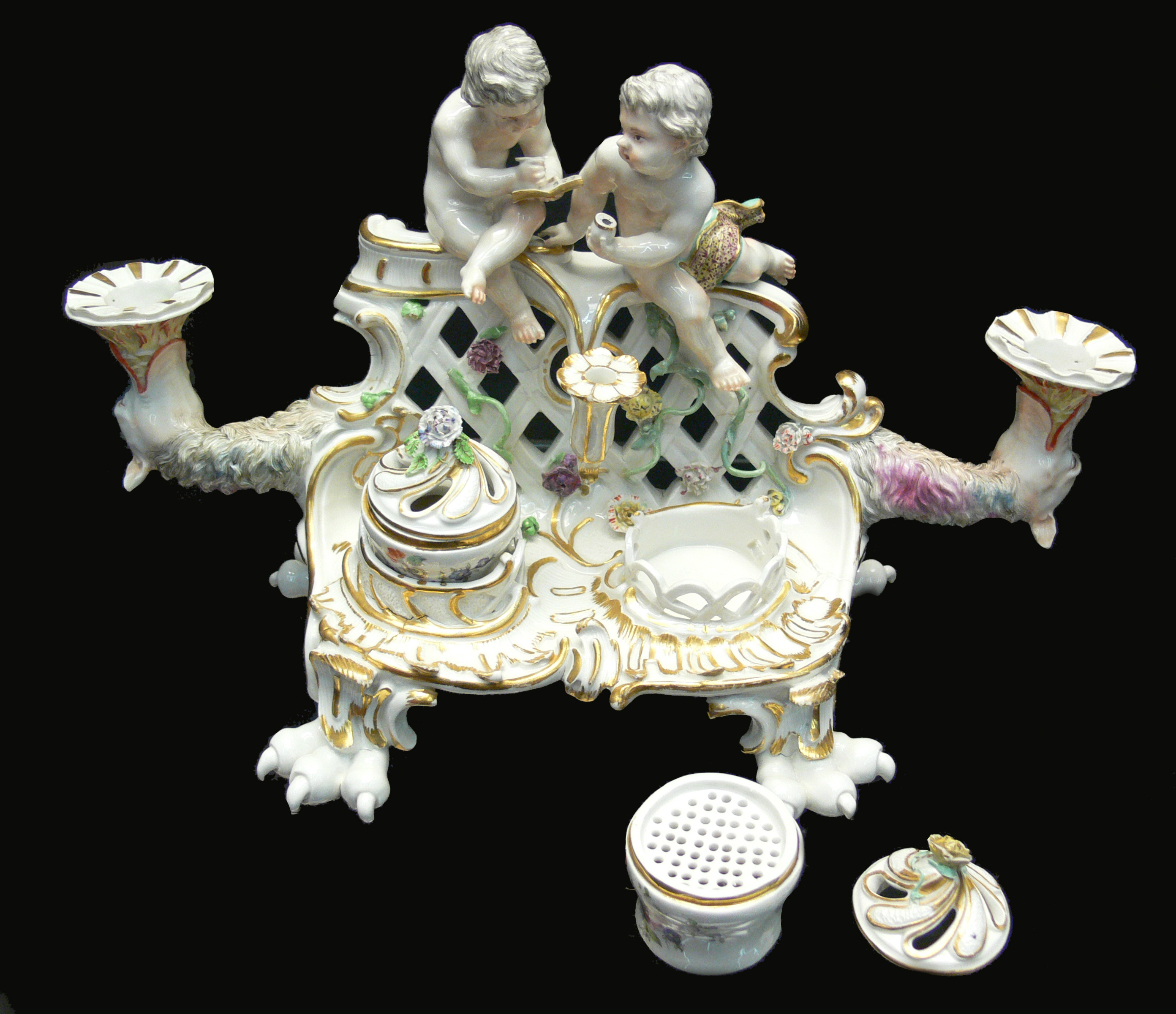 Schreibzeug mit Putten und Kerzenhalter, Ludwigsburger Porzellan, um 1765 Gallery: Reiss-Engelhorn-Museen, Mannheim